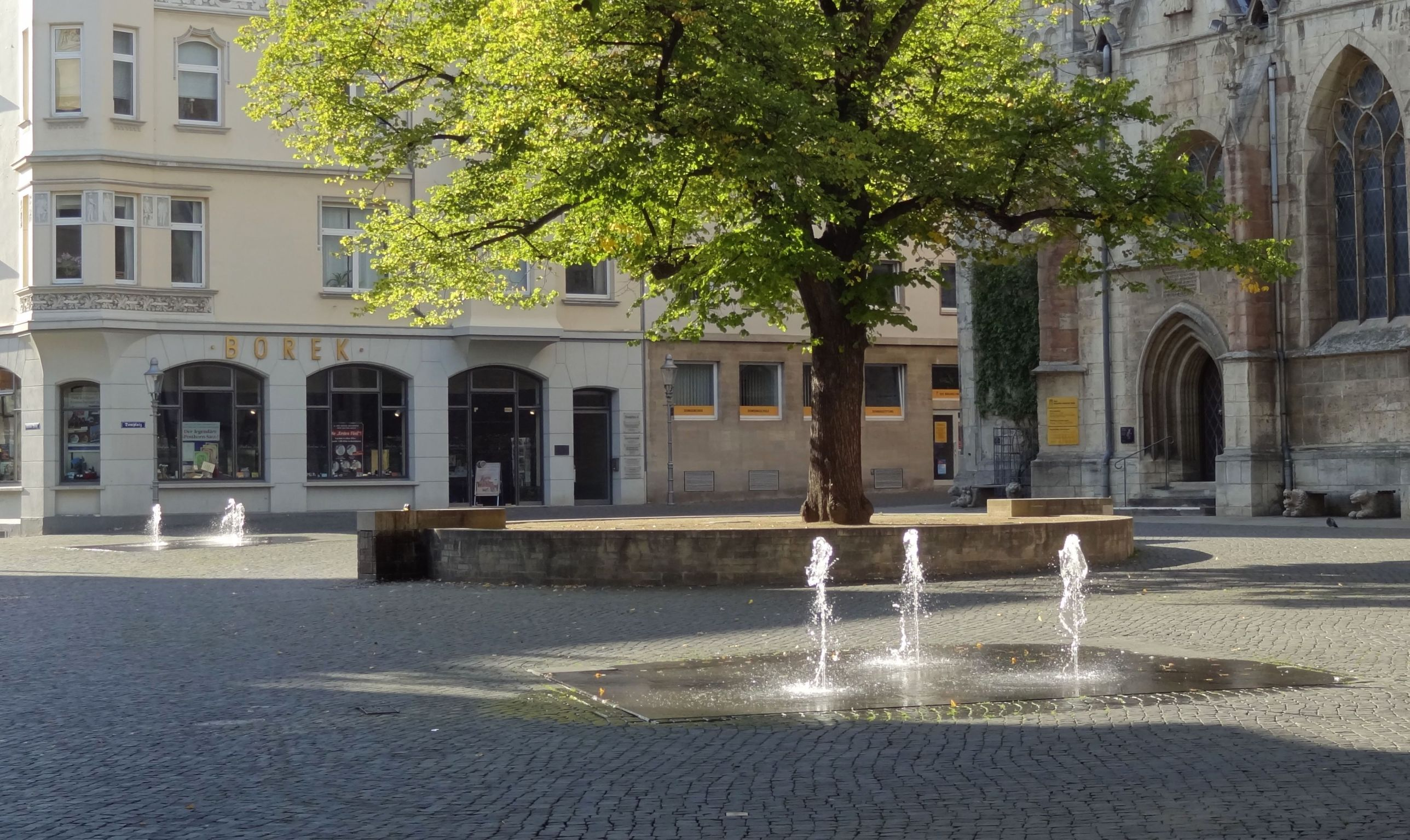 Wasserspiele auf dem Domplatz in Braunschweig